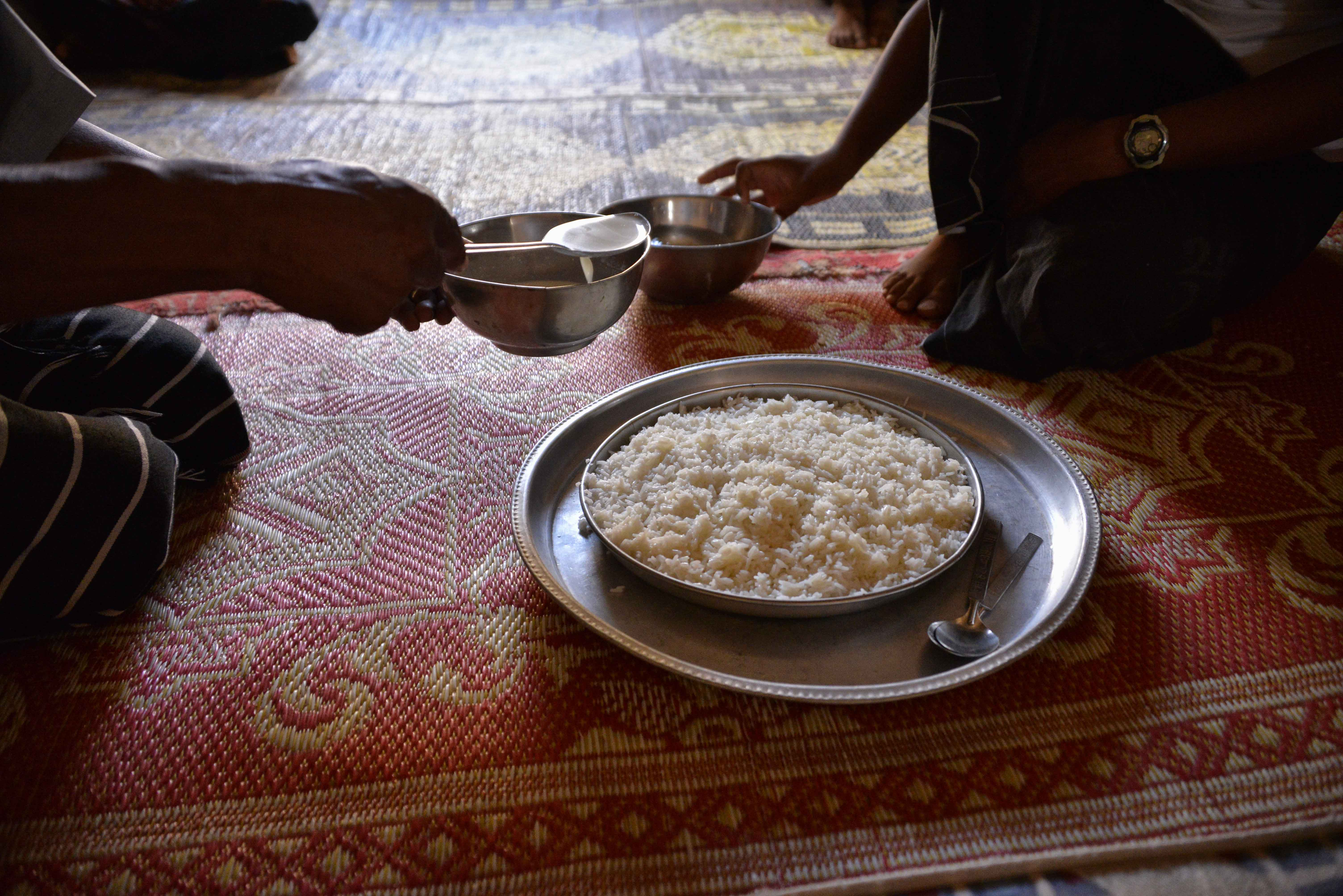 Yemen